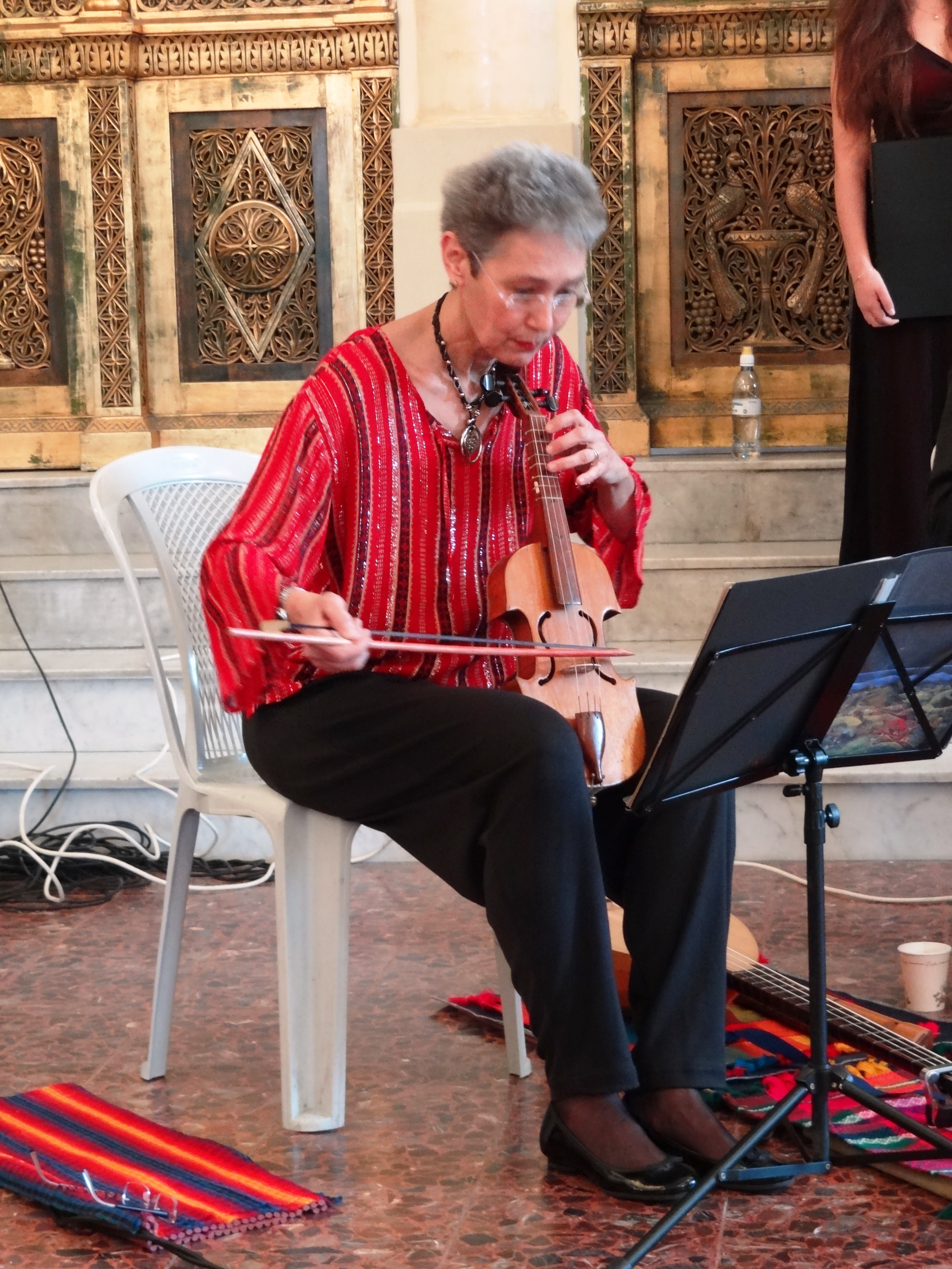 Myrna Herzog musical director, conductor, viola da gamba soloist from Israel מירְנה הרצוג, מוזיקאית ישראלית העוסקת במוזיקה עתיקה. ייסדה את אנסמבל פניקס למוסיקה עתיקה מירנה בהופעה בחג של החגים בכנסיית עין דור בחיפה